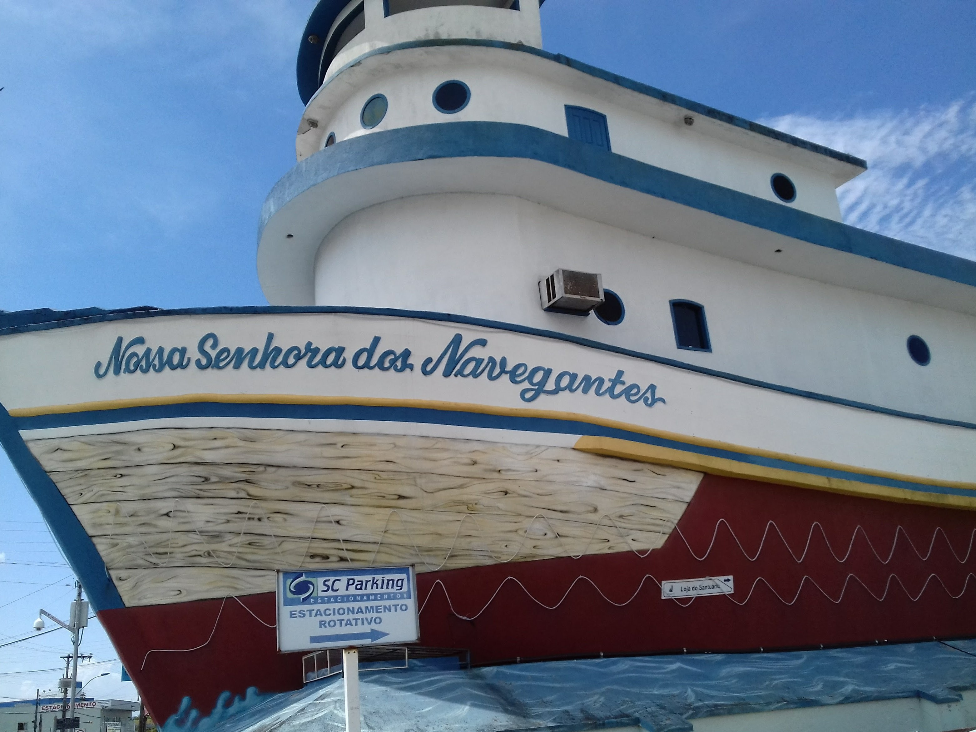 Casa Paroquial, localizada em Navegantes(SC), destaca-se pela varanda em forma de barco